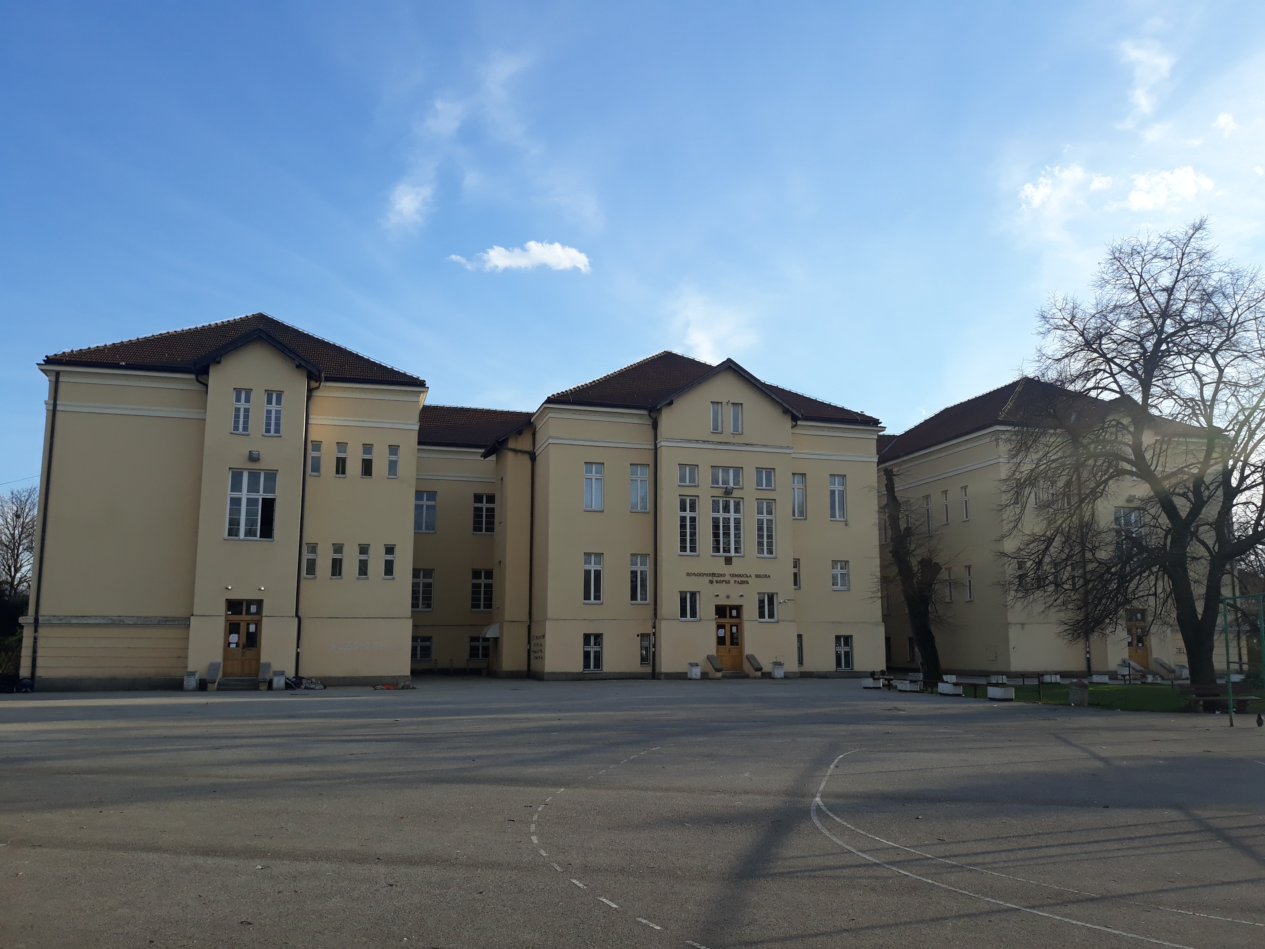 Зграда Пољопривредне школе на Ратарском имању у Краљеву.